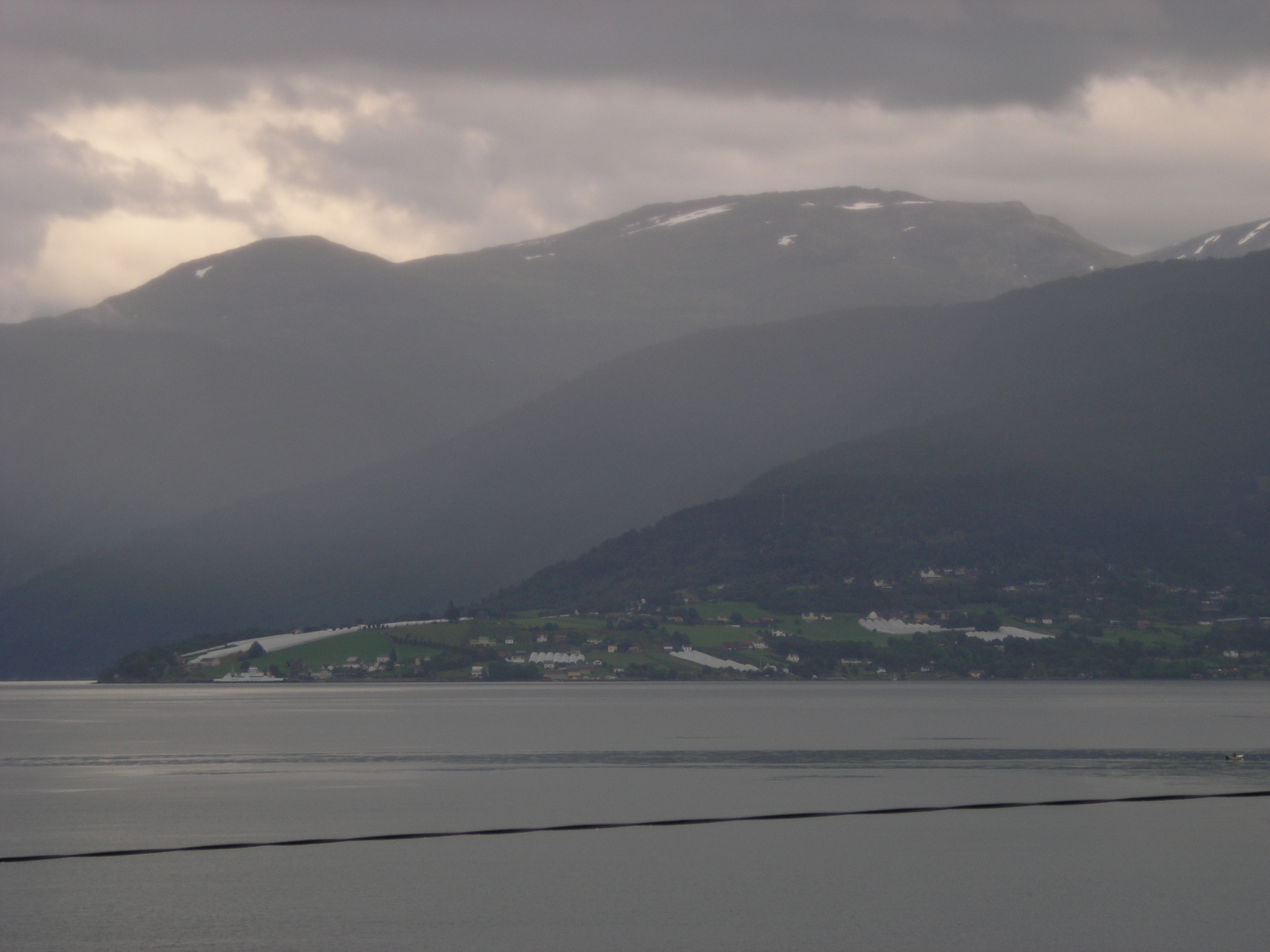 Vangsnes sett frå Holmen i Balestrand